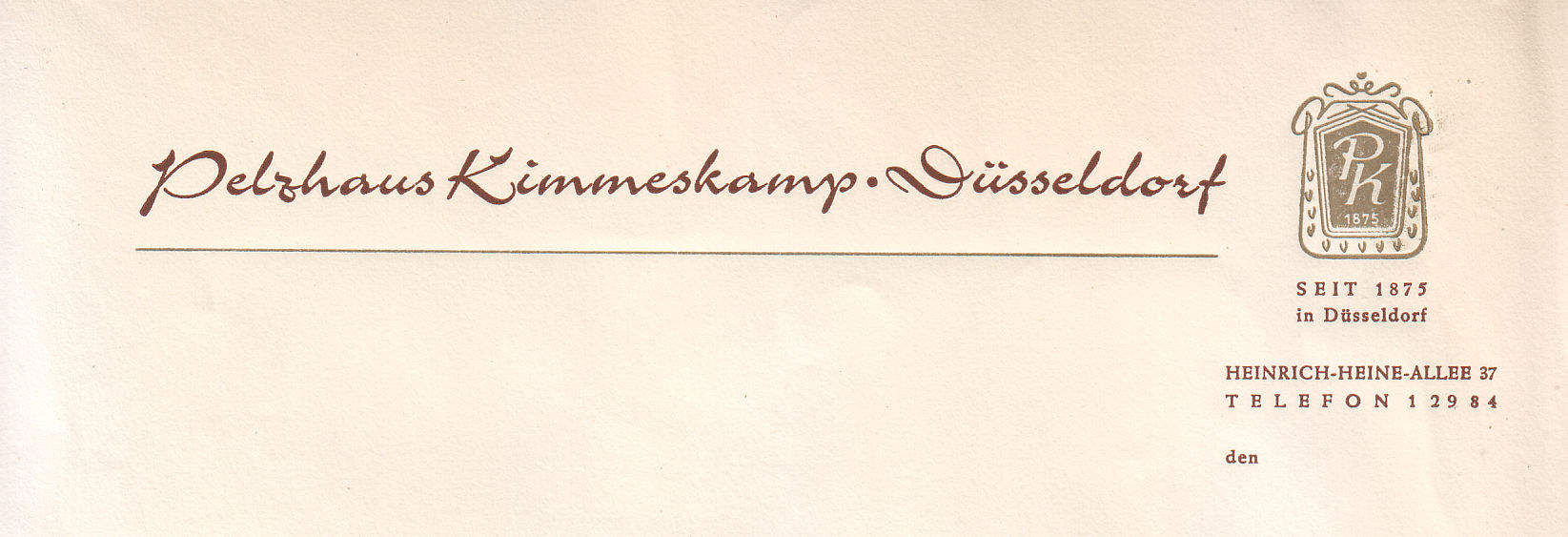 Pelzhaus Kimmeskamp (Inhaber Frau Wieler-Kimmeskamp), Heinrich-Heine-Allee-37. Seit 1875 in Düsseldorf. Briefkopf aus dem Jahr 1971. 1928: Düsseldorf. Das Pelzhaus Kimmeskamp, vorm. Wessoly, Hindenburgdamm 39 [heute Heinrich-Heine-Allee], das seit 1875 besteht, führt zurzeit einen größeren Neubau aus, durchgehend bis zur Neustraße. In den hinzugekommenen Räumen wird eine Spezialabteilung für Damen-Mäntel (Pelz) eingerichtet. Im Keller wird eine größere Tresoranlage zur Aufbewahrung von Pelzen geschaffen.In: Das Pelzgewerbe Nr.67, Leipzig, 4. Juni 1928 Im September des Jahres verkündete die Firma die Fertigstellung des angegliederten Neubaus. In den letzten Jahren seines Bestehens gehörte das Unternehmen zur Pelzhandelsgesellschaft Rosenberg & Lenhart, Frankfurt am Main.